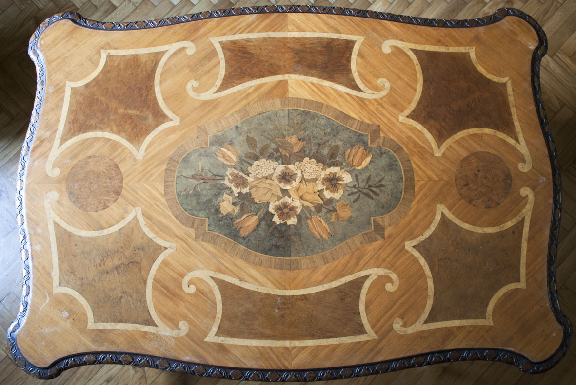 Tavolo da pranzo intagliato eseguito da Francesco Ferrario negli anni '30 del XX secolo. Collezione privata.